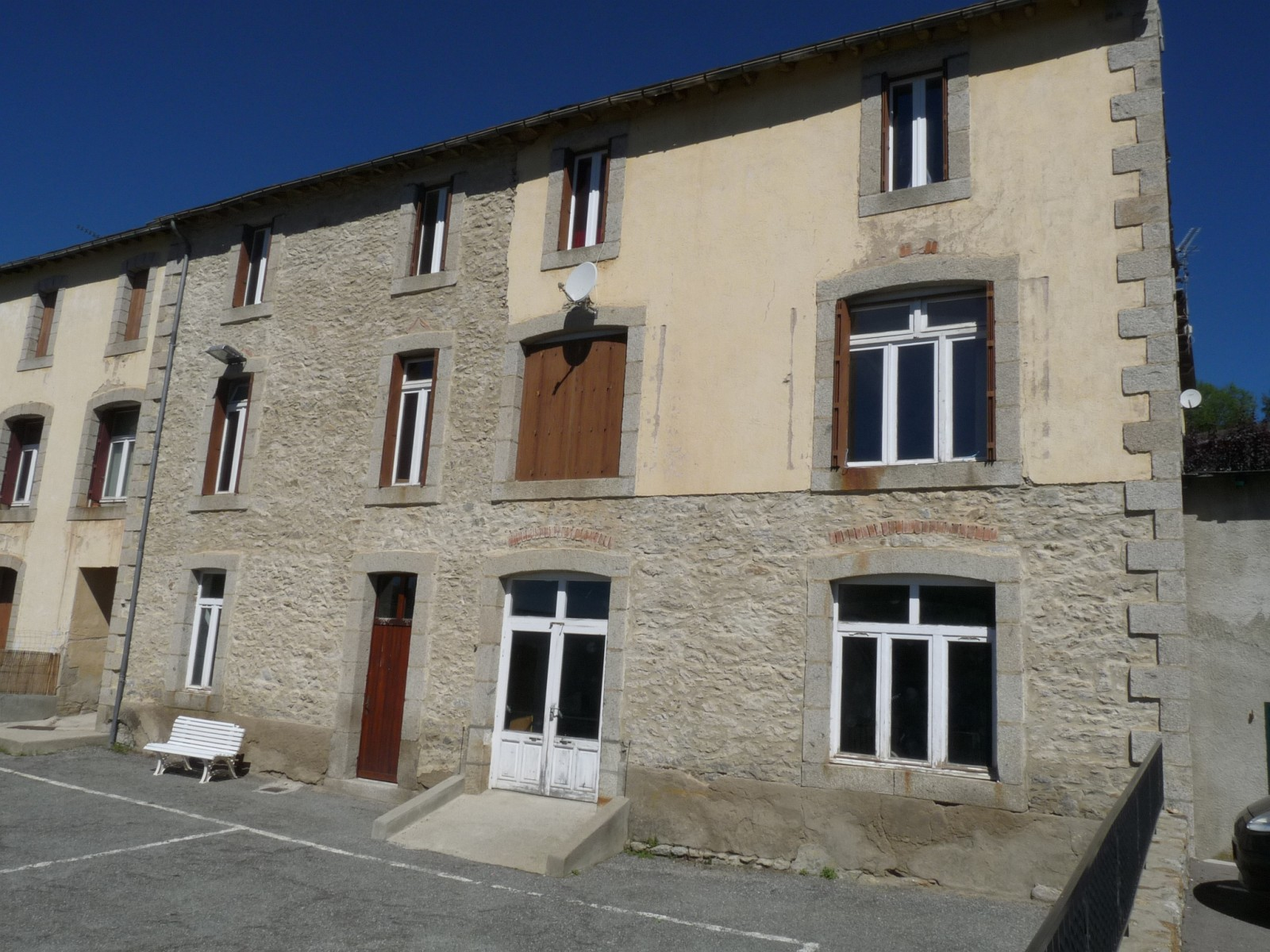 Ecole de Dorres, Pyrénées-Orientales, France